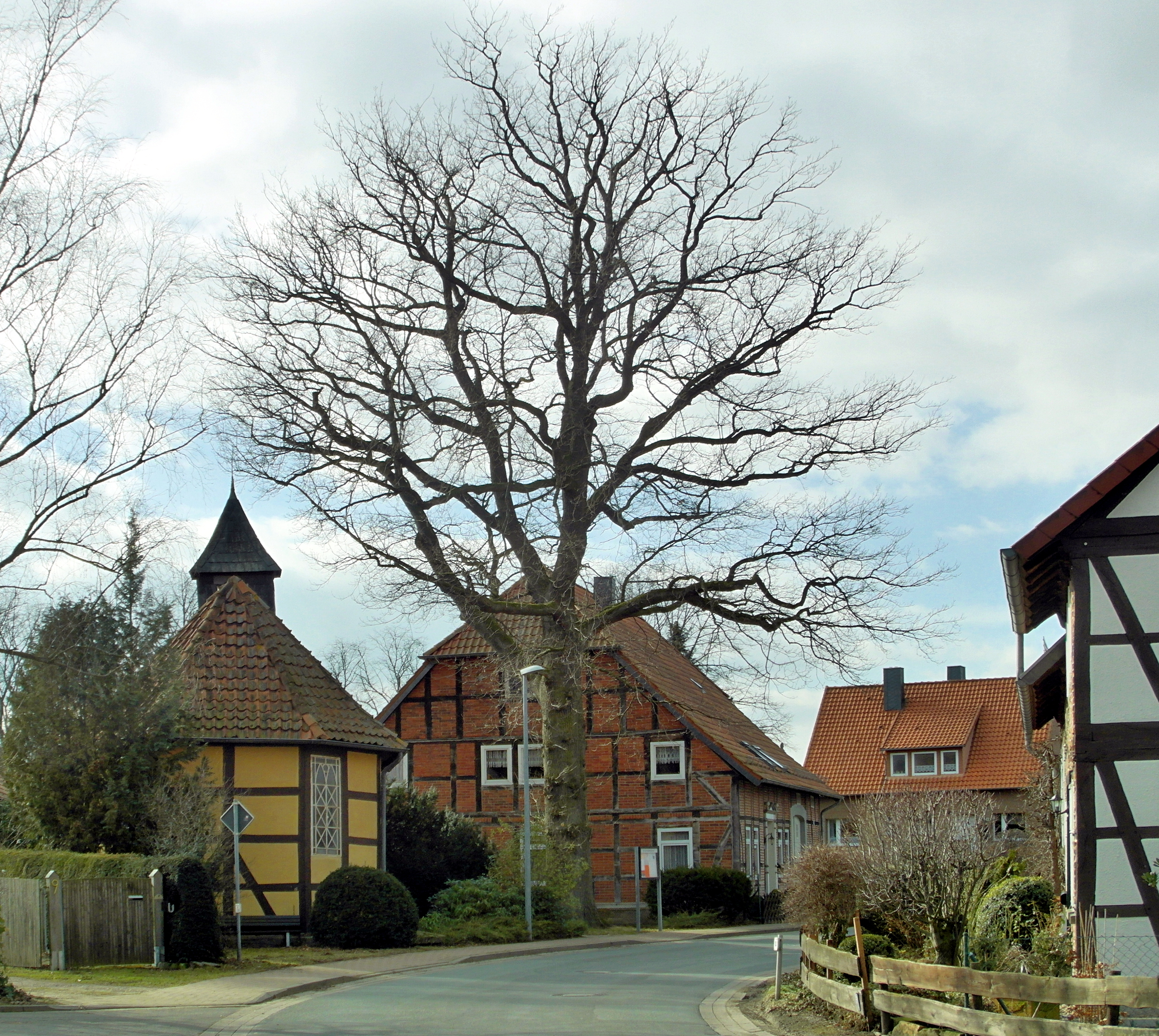 Das Naturdenkmal ND-H 35 Luthereiche wurde am 10. November 1883 im heutigen Gehrdener Stadtteil Redderse gepflanzt.